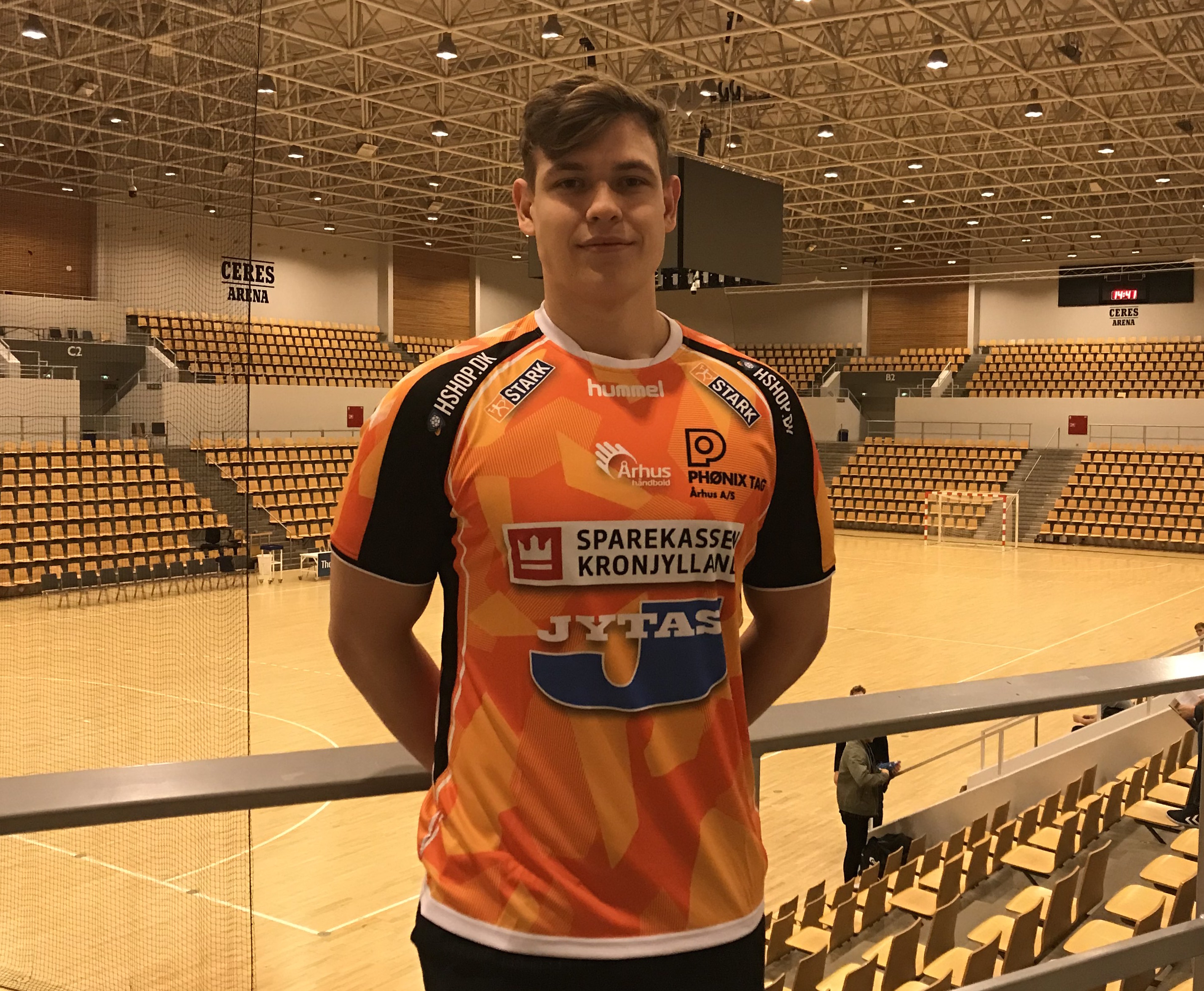 Billedkreditering: Århus Håndbold